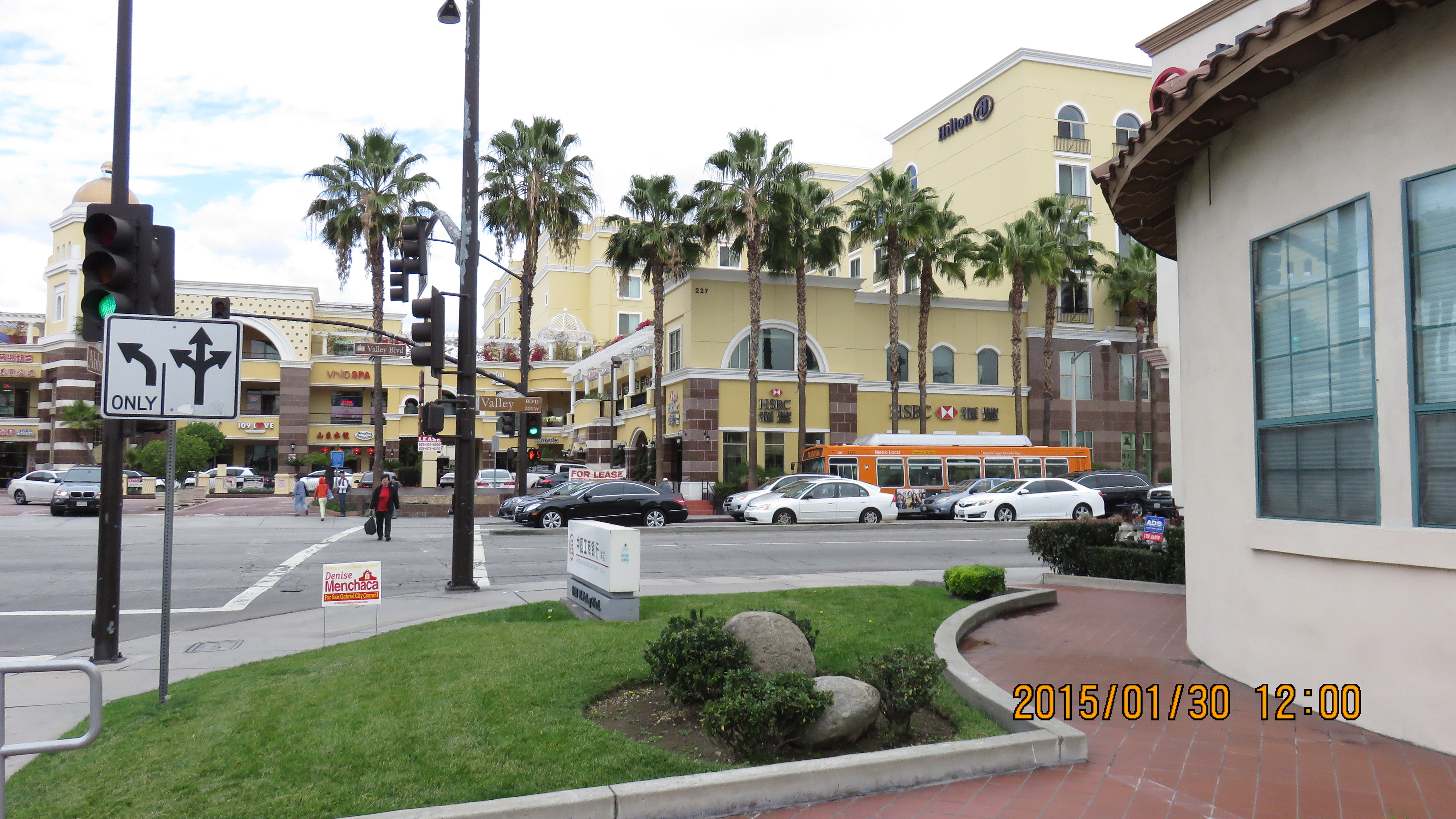 San Gabriel, CA, USA